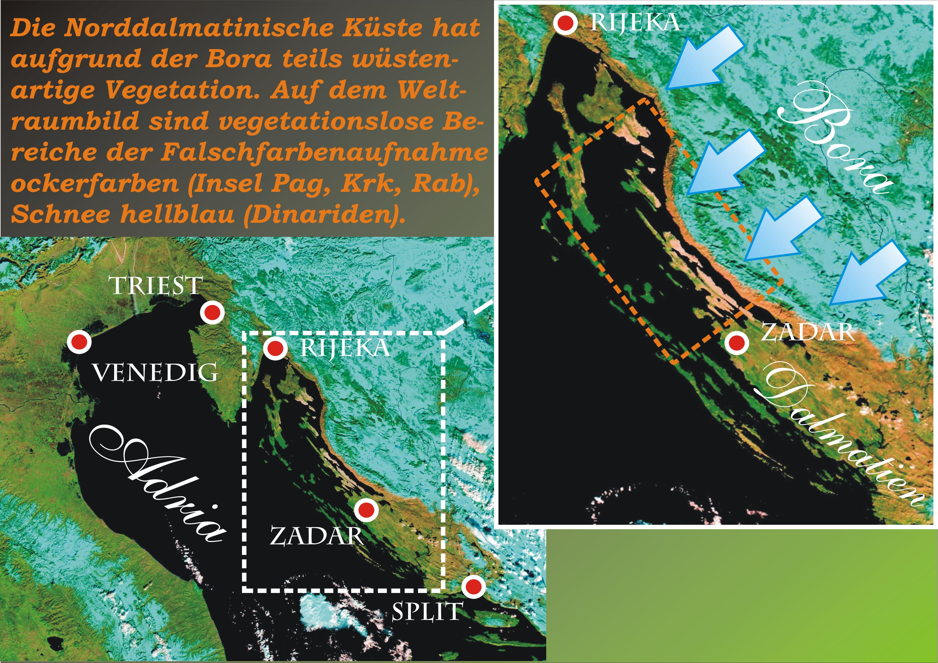 IRS-Liss false colour image